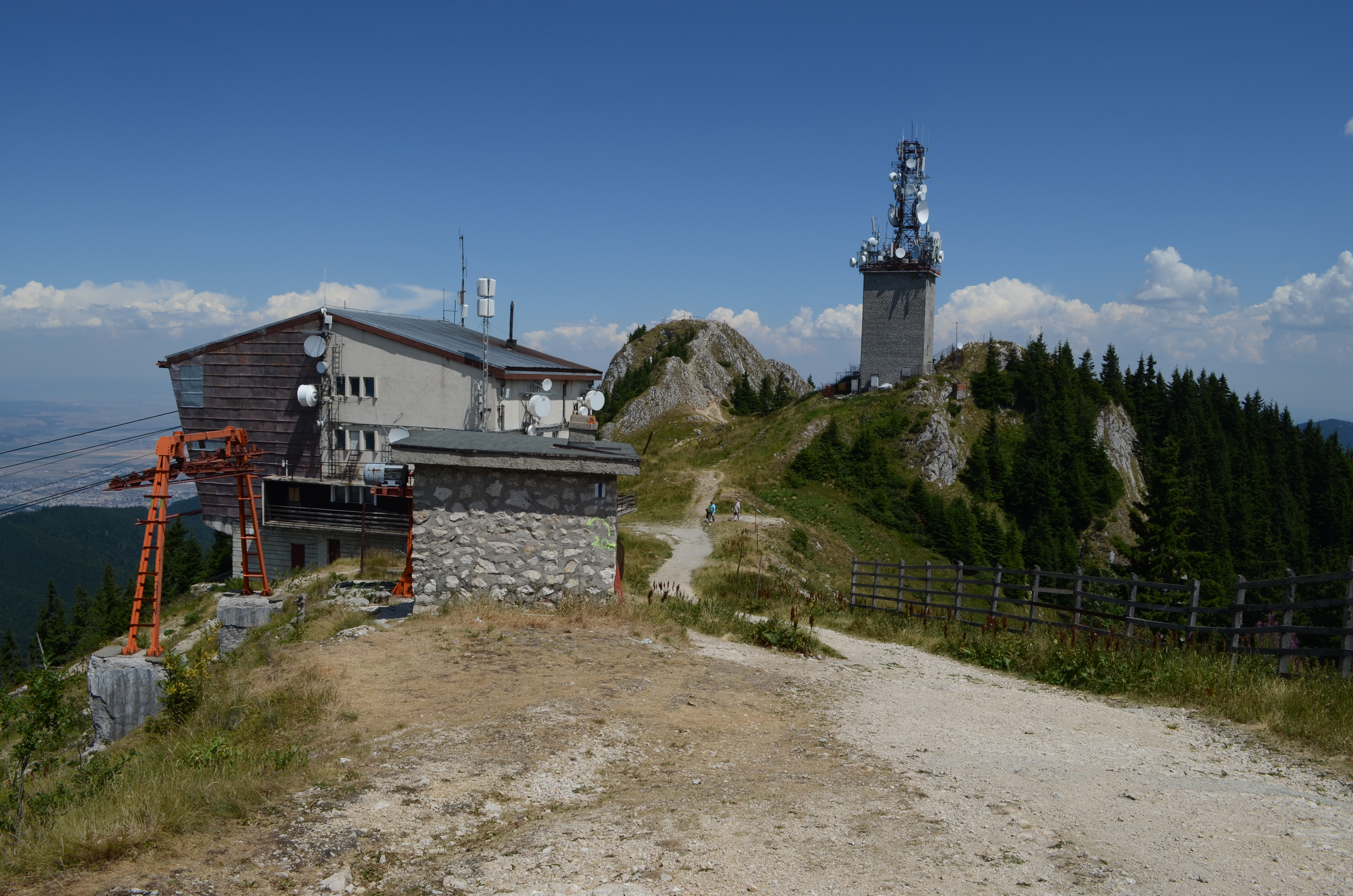 Српски (ћирилица): Поглед према врху Поставарул 1799 м